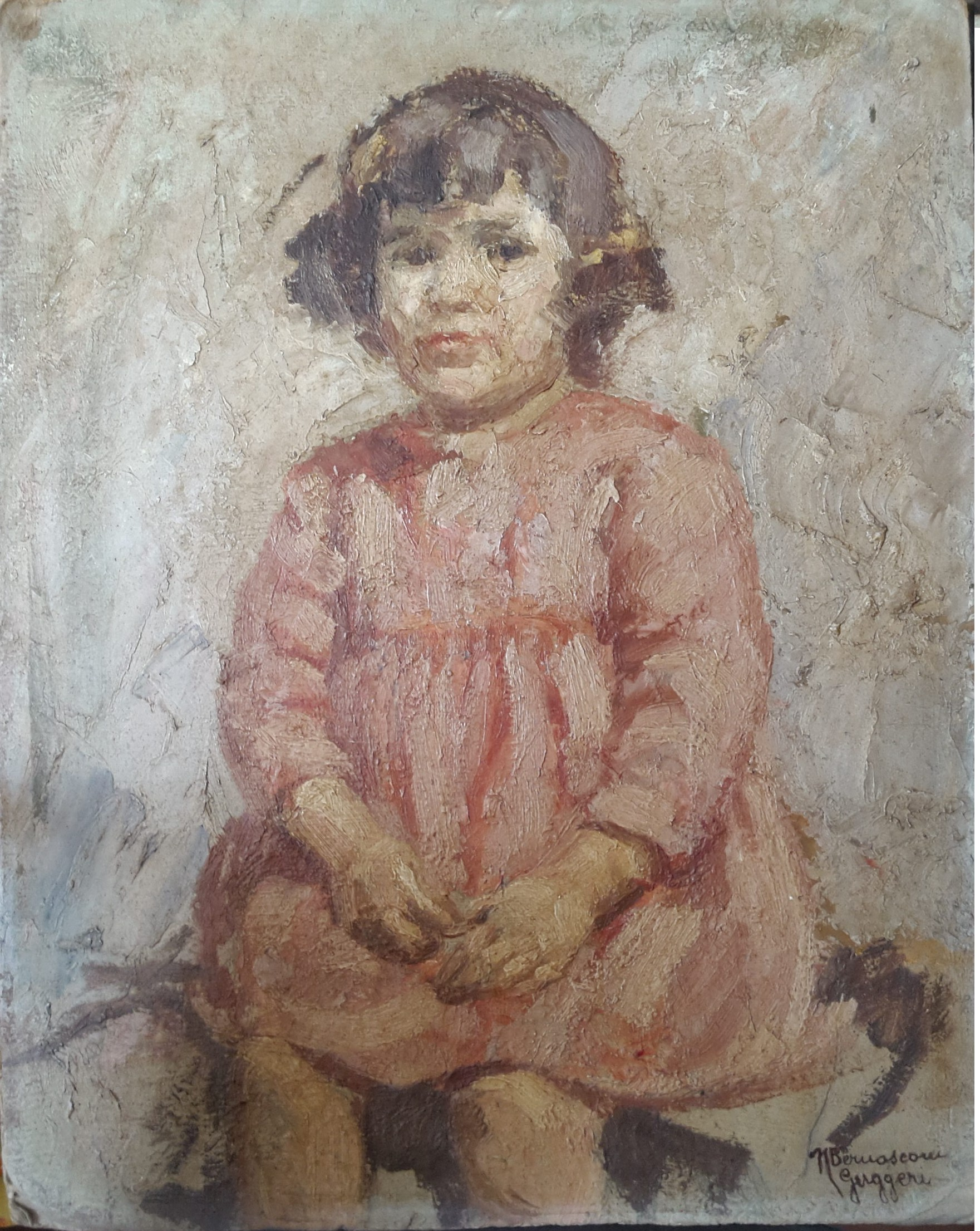 N.Bernasconi Guggeri_ Giannina _óleo sobre carton